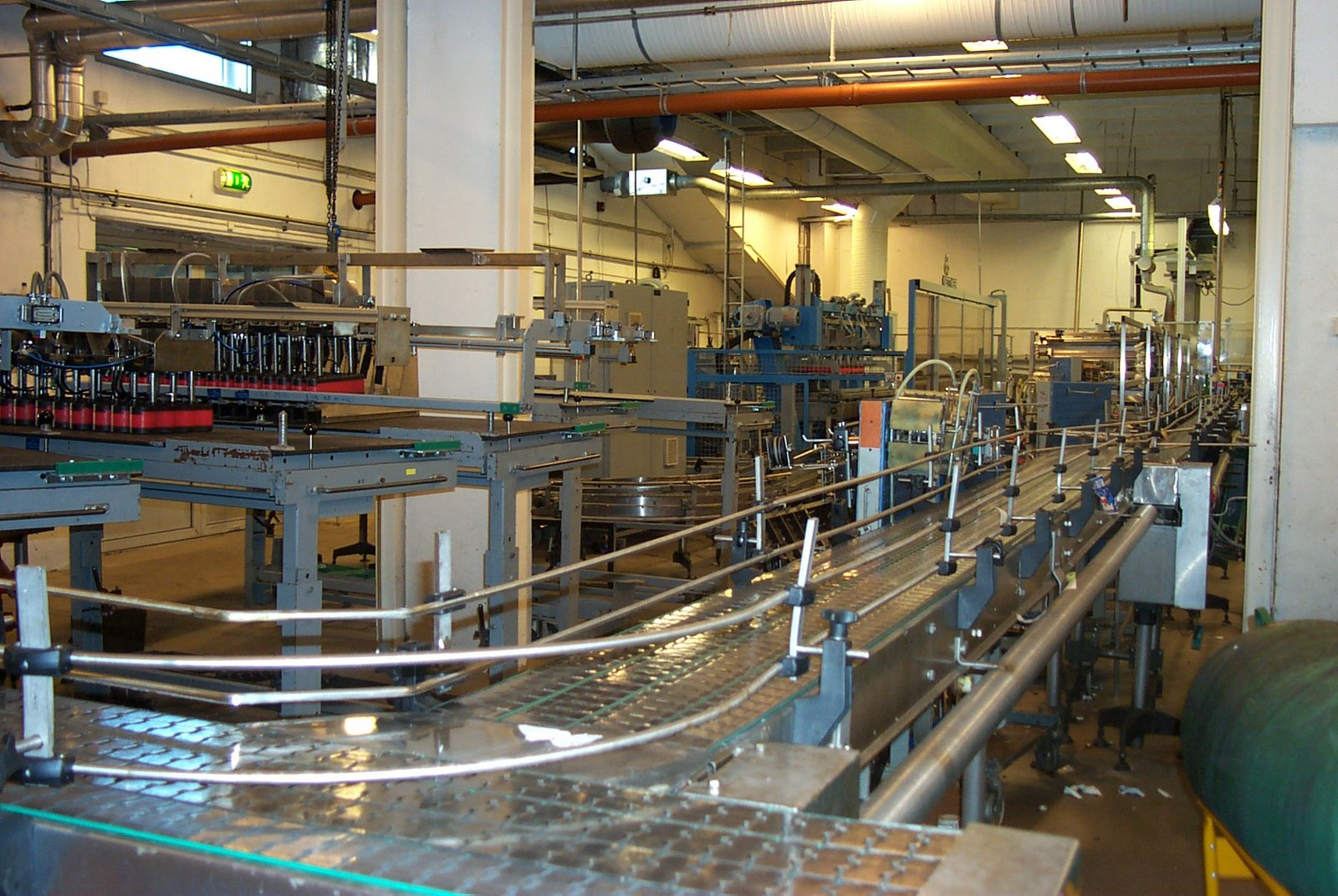 Bildet er fra tapperiet i det nå nedlagte Nordlandsbryggeriet. På bildet ser du et av samlebåndene.